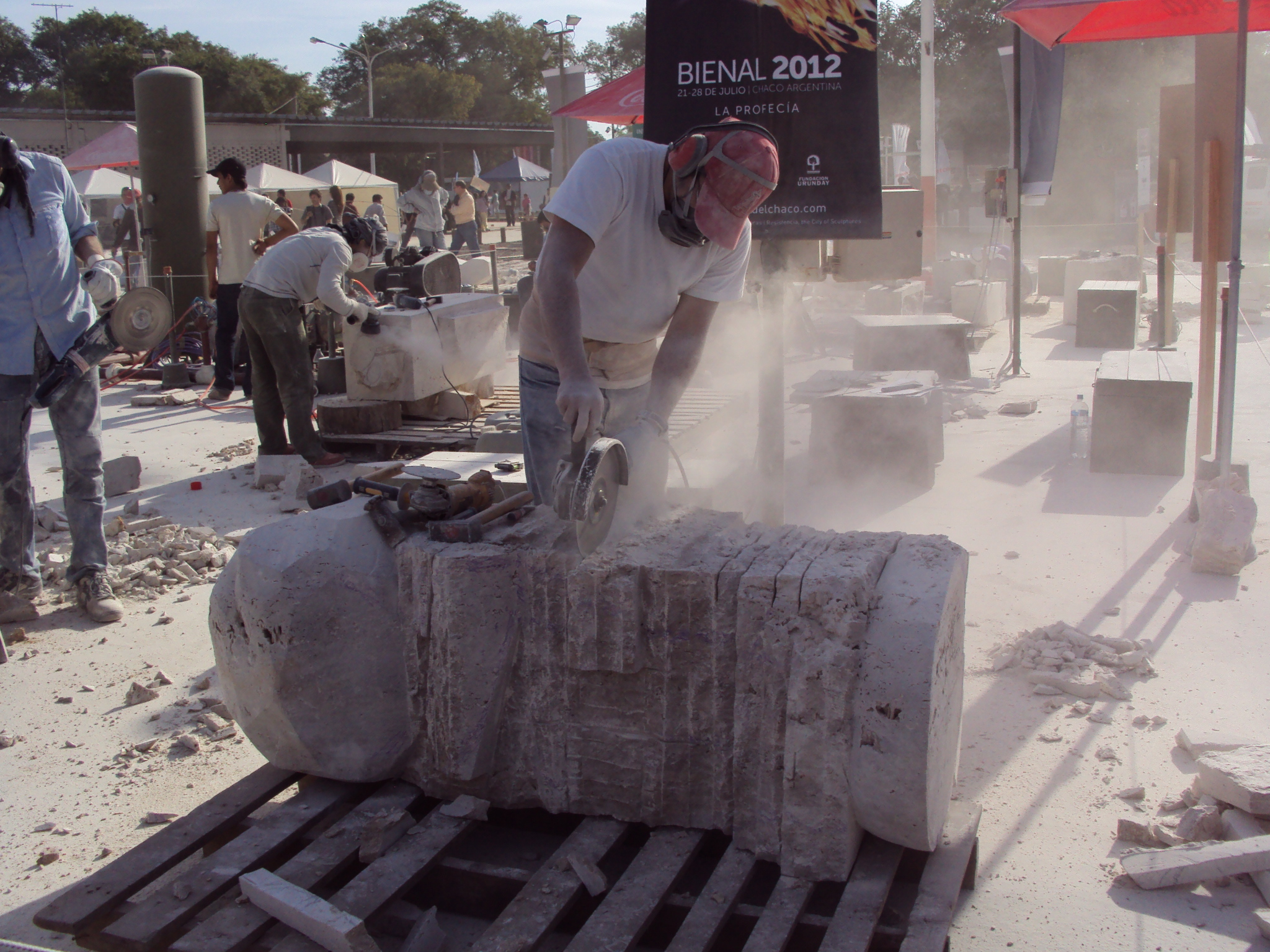 Tallado de escultura